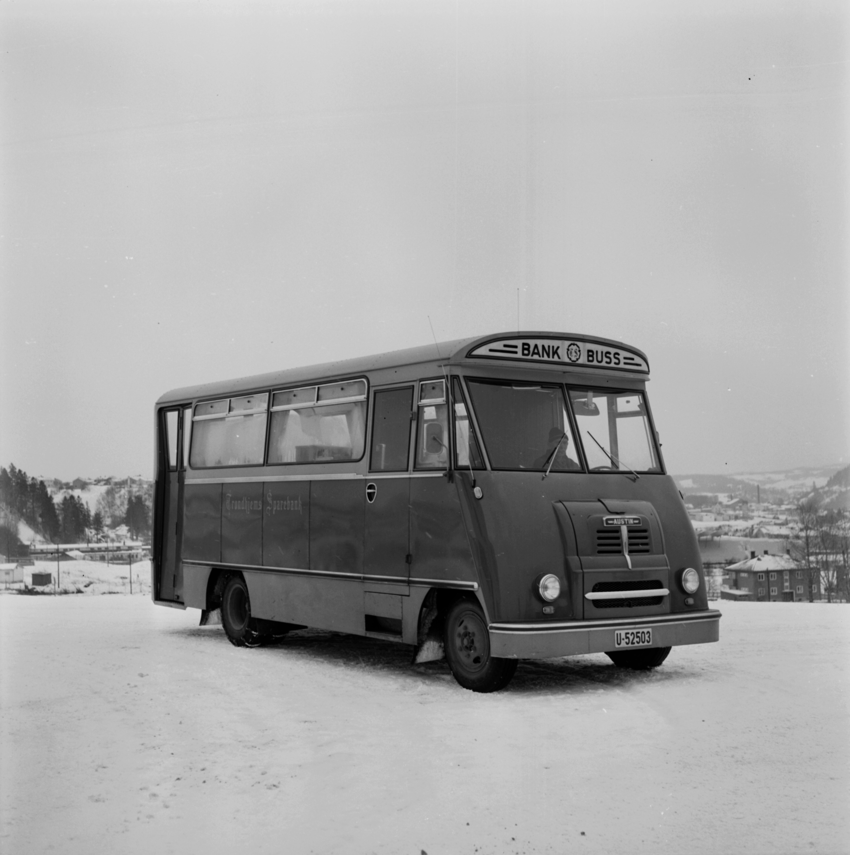 Trondhjems Sparebank's bankmobile